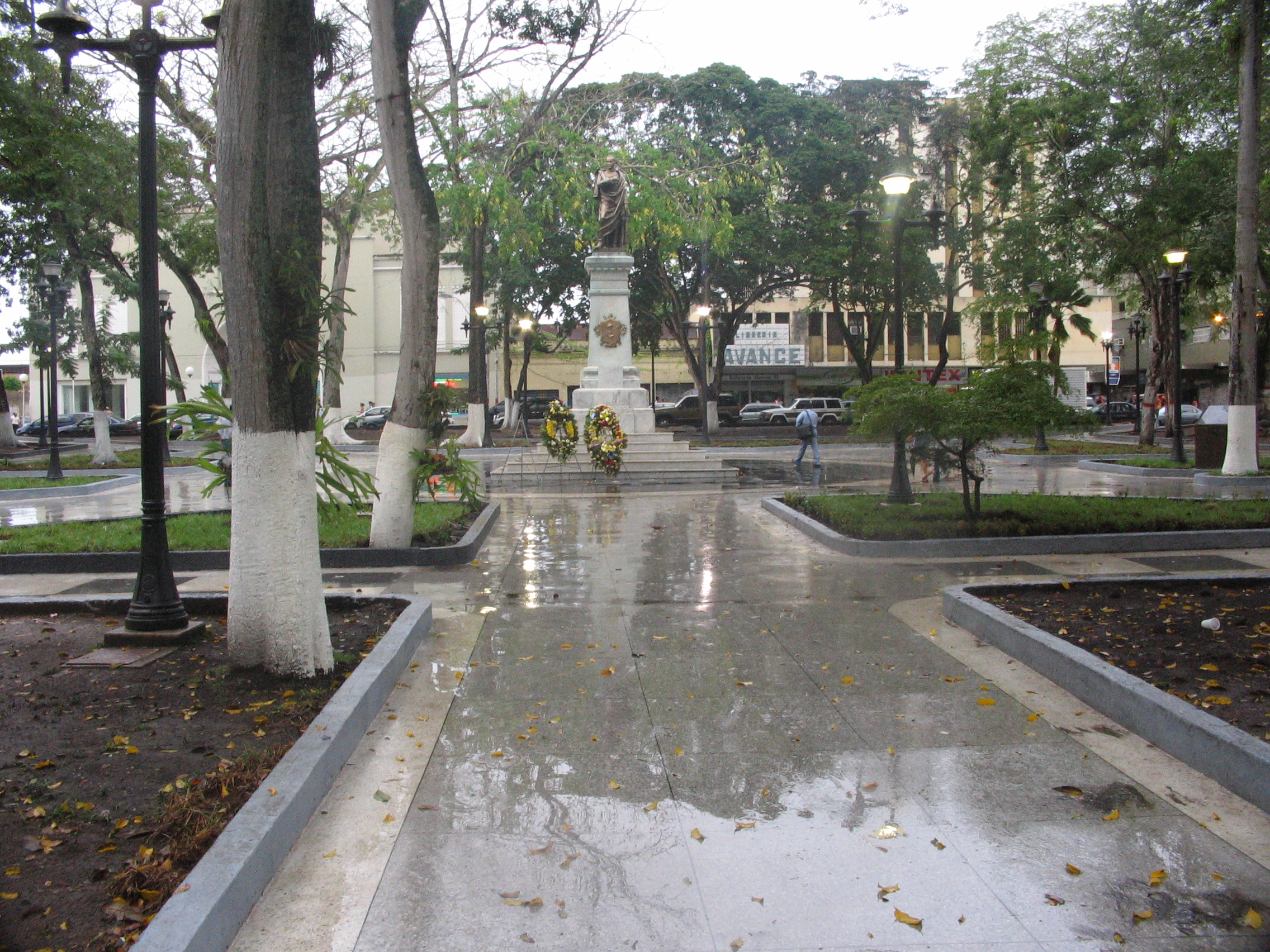 Plaza Bolivar en Maturín, Monagas, Venezuela.